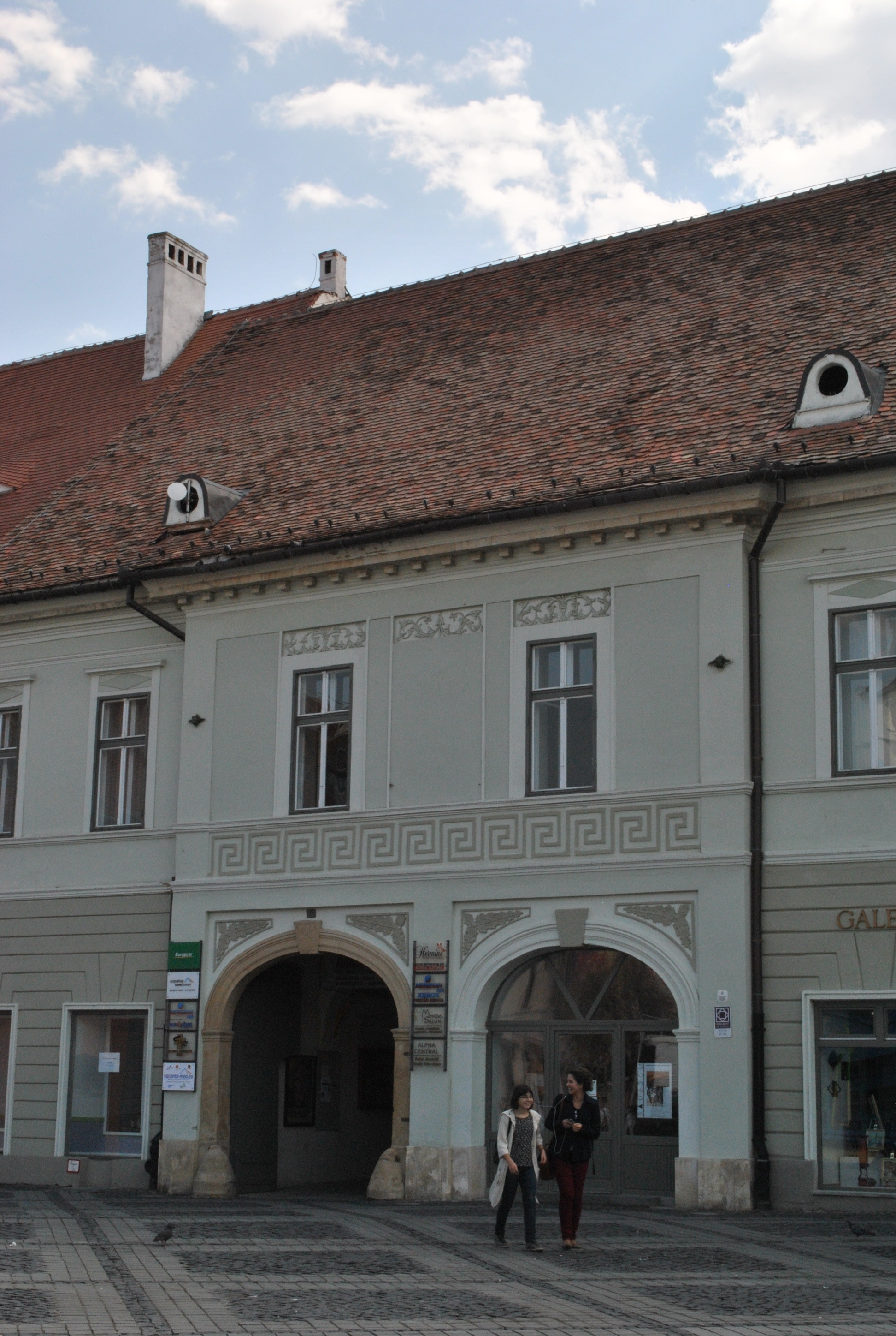 Casă, sec. XV - primul sfert al sec. XIX